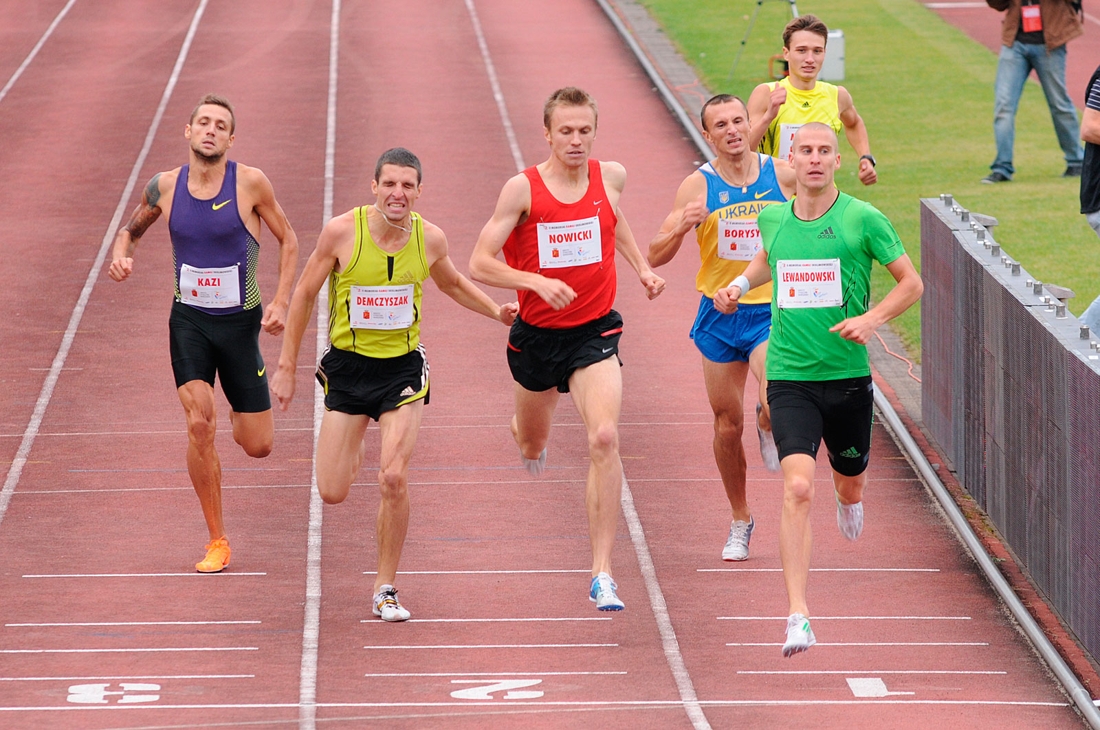 Marcin Lewandowski 2 miejsce w biegu na 800m podczas 2. Memoriału Kamili Skolimowskiej w Warszawie